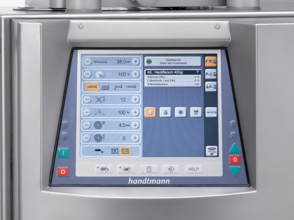 Vakuumfüller Touchscreen Bildschirmsteuerung